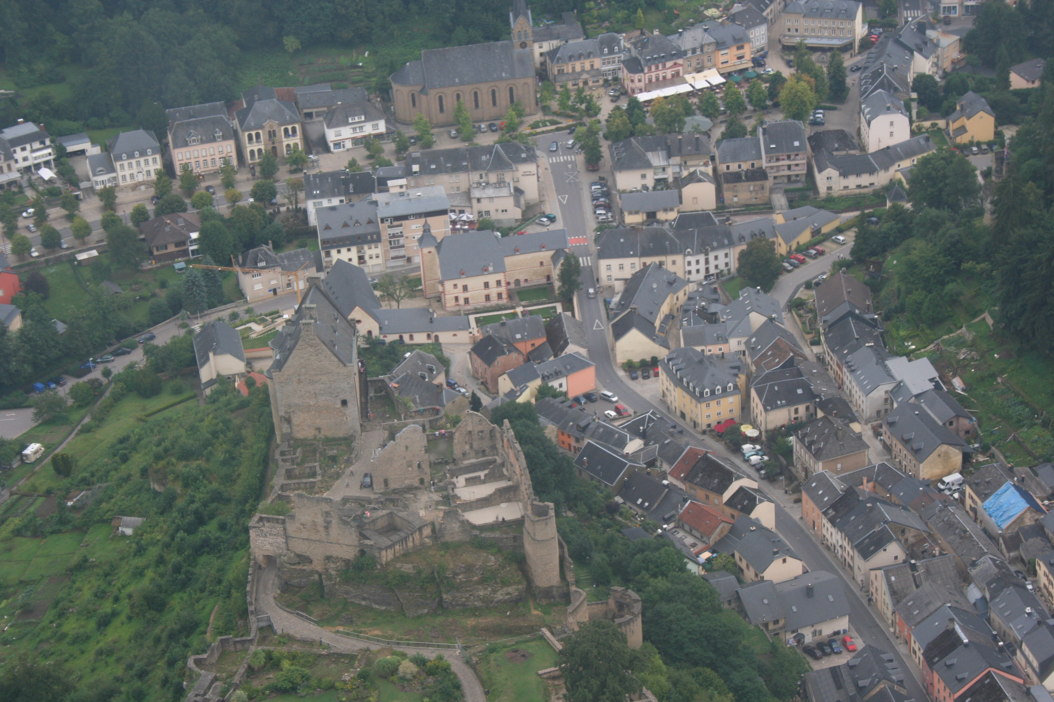 Le château et la localité luxembourgeoise de Larochette